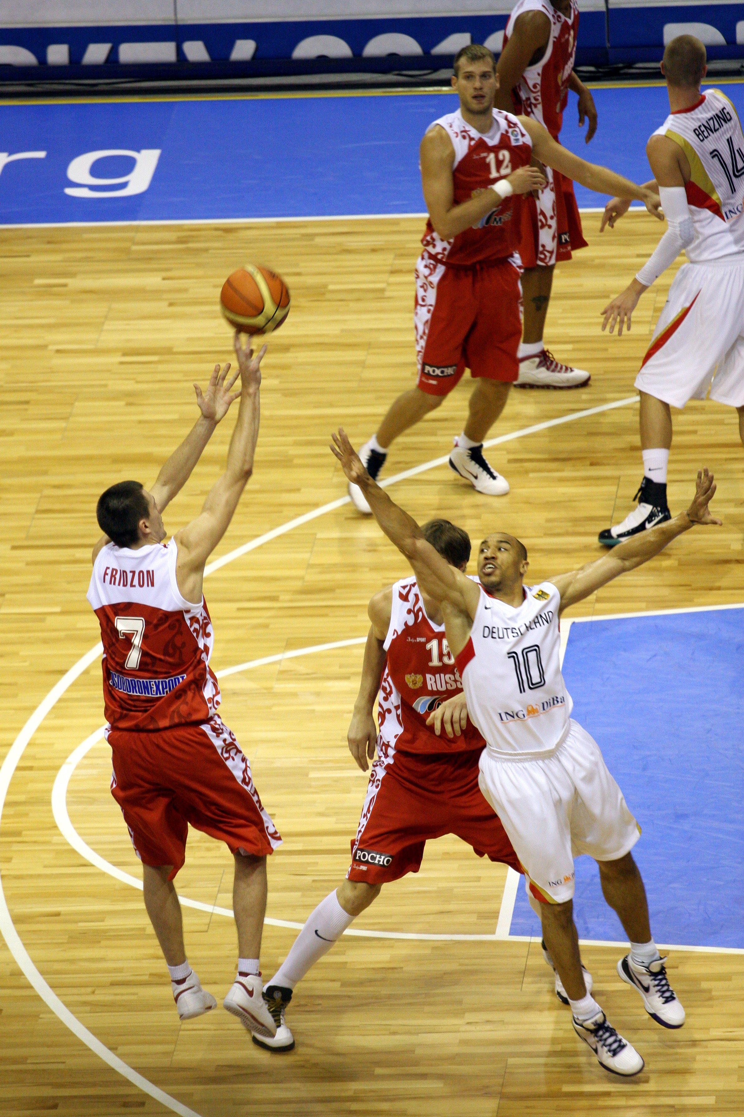 EuroBasket 2009 Poland